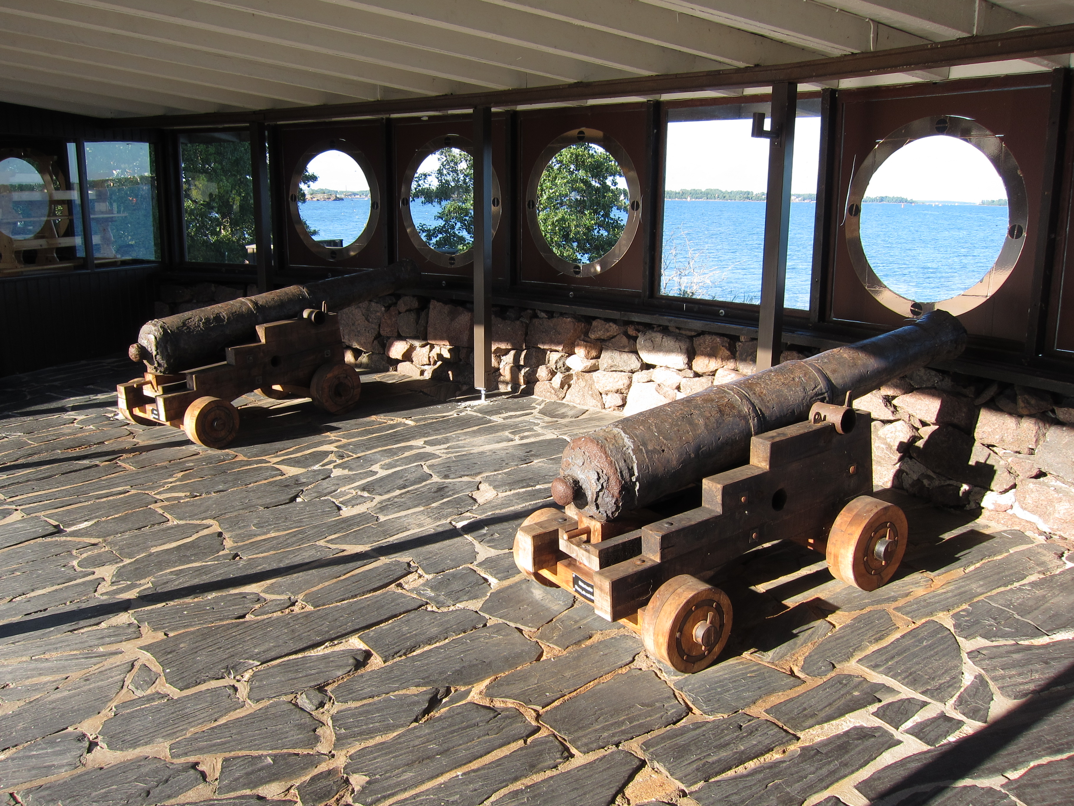 Kotkan Varissaaressa sijaitsevan ravintolarakennuksen yhteydessä näytteillä olevia kanuunoita. Ravintolarakennus on rakennettu Fort Elisabethin muurien sisään.